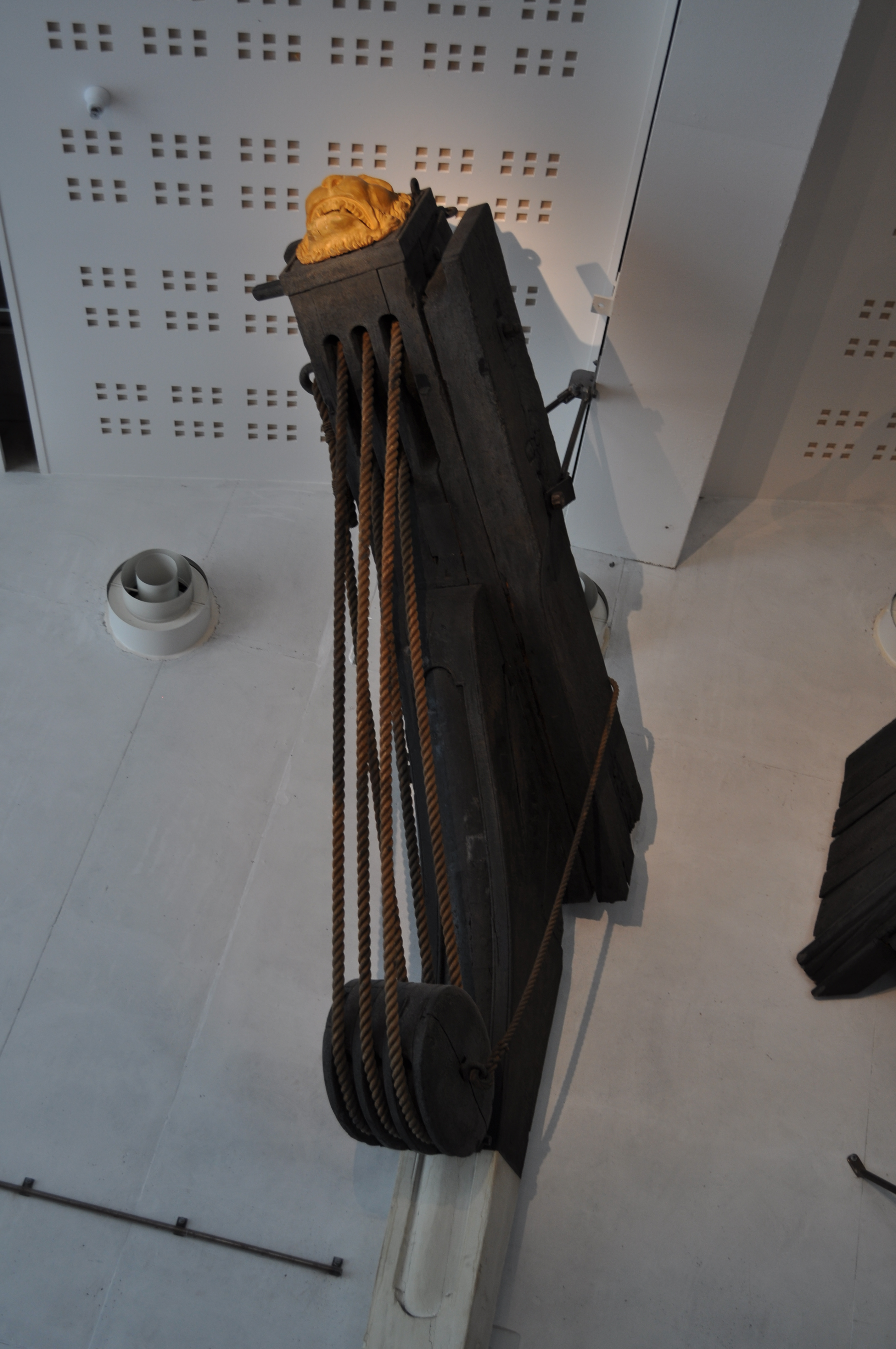 Kranbalk